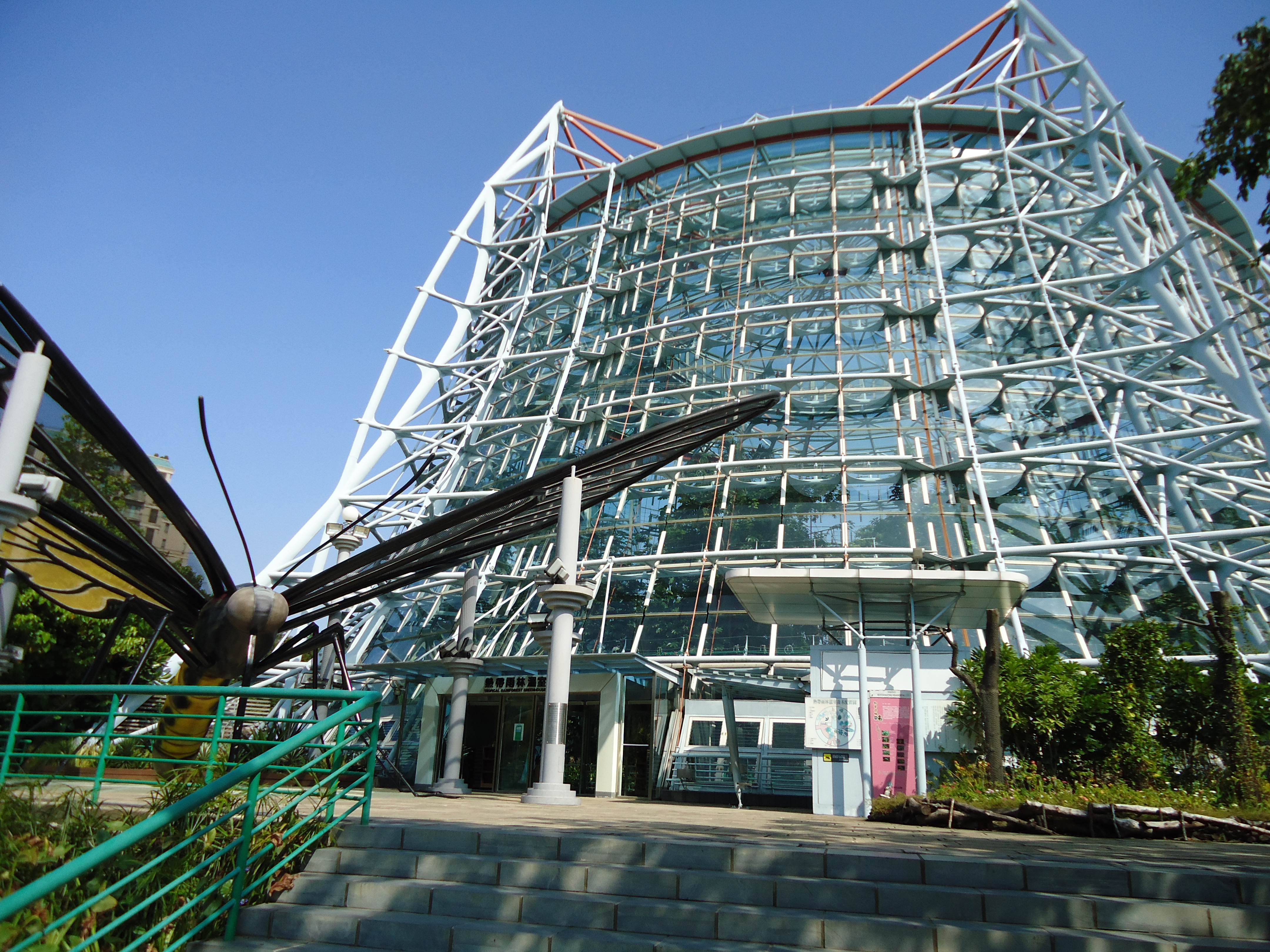 國立自然科學博物館植物園。